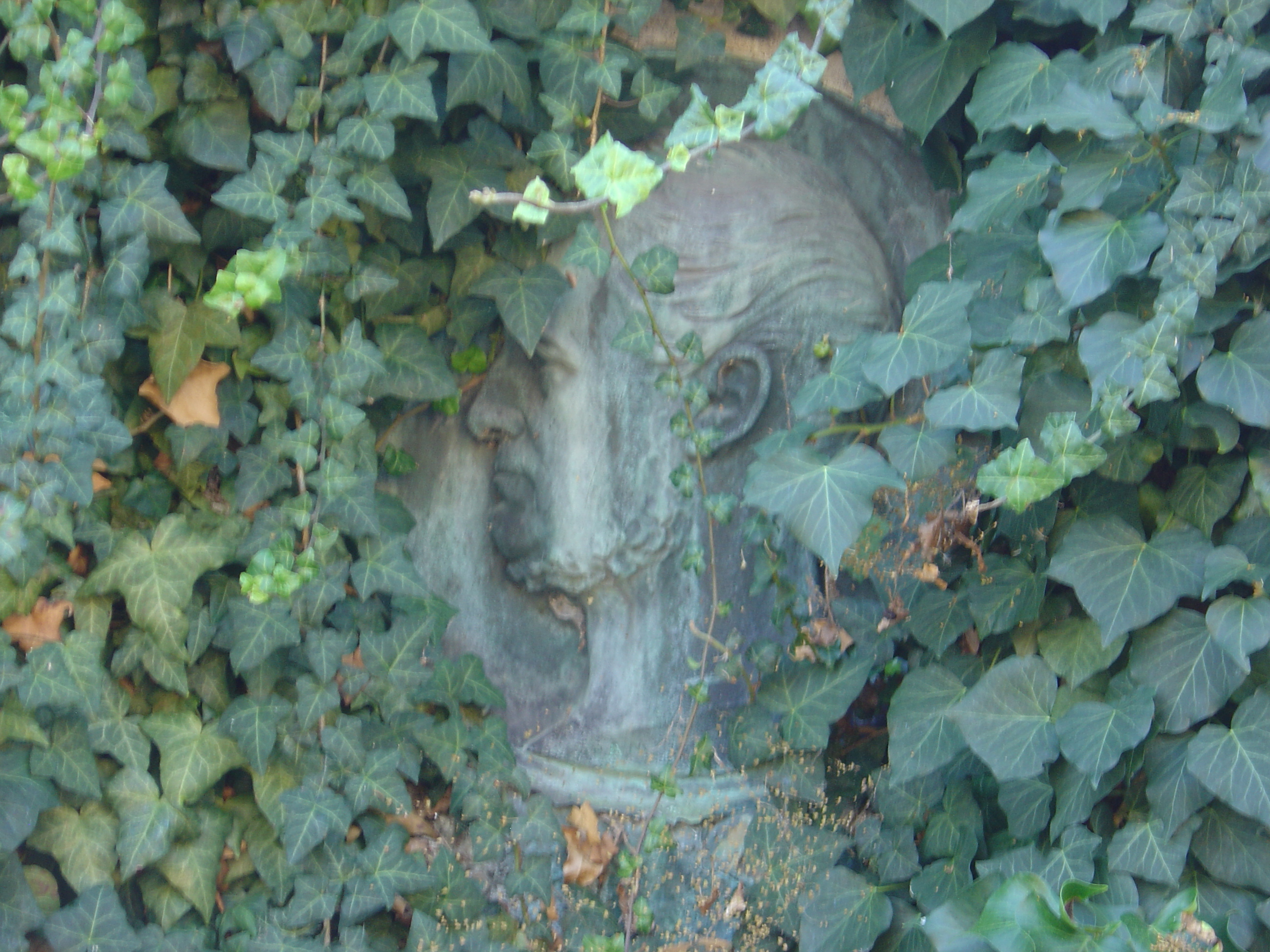 Médaillon représentant Charles Kestner. Tombe du couple Kestner-Rigau.